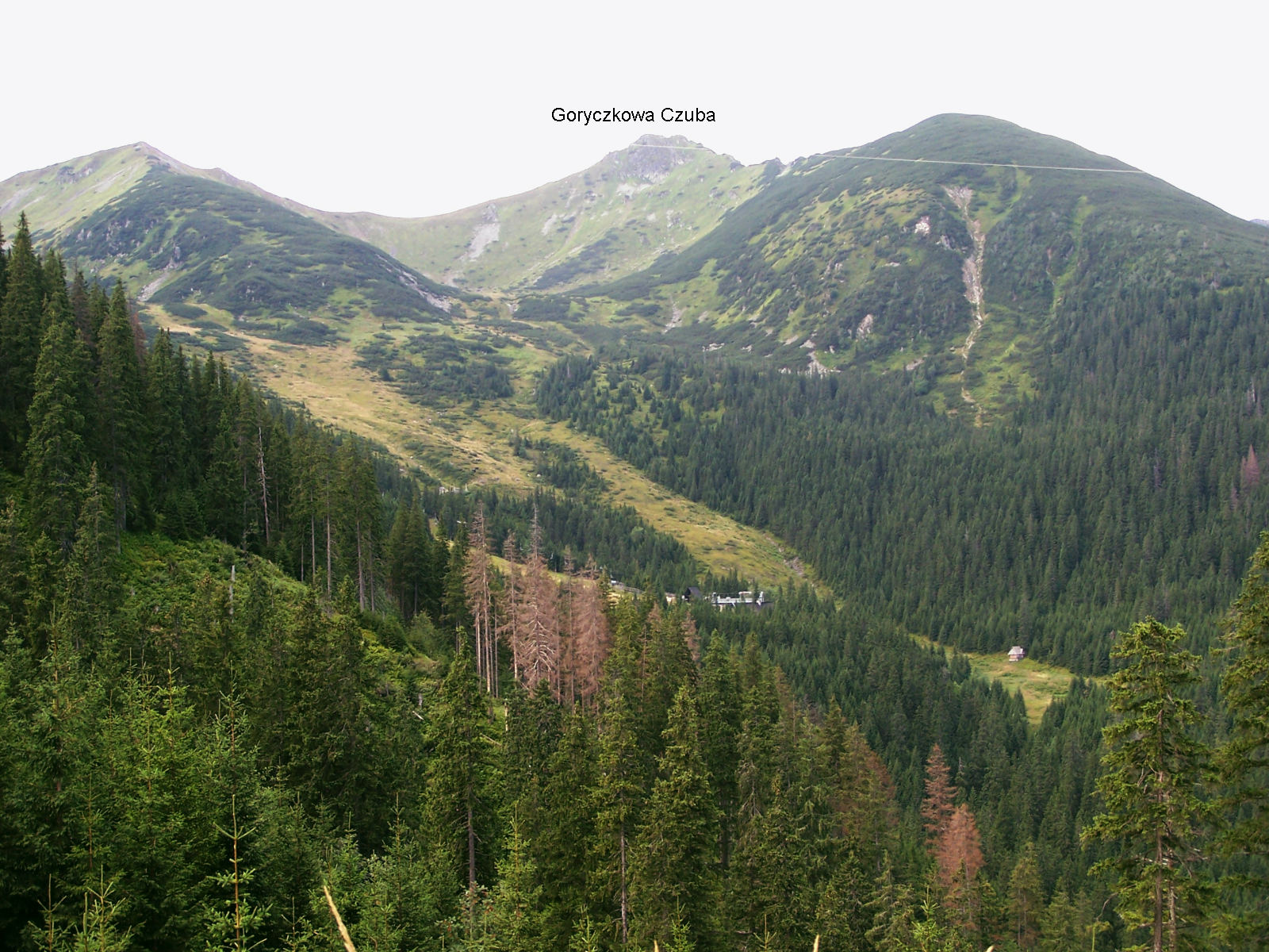 Dolina Goryczkowa (West Tatra Mountains)